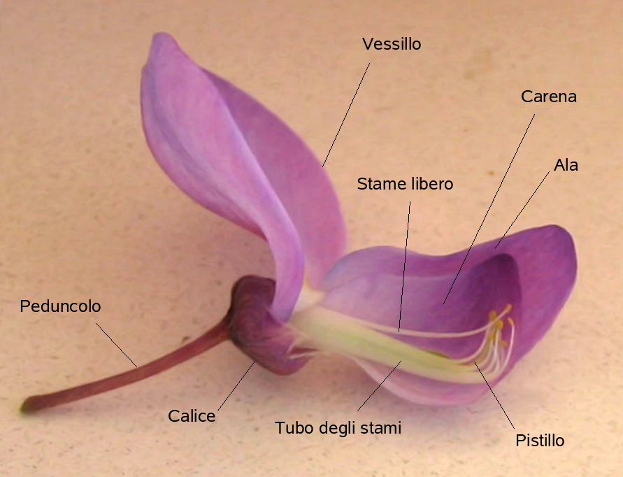 Descrizione di un fiore di Wisteria sinensis (glicine). Non so usare grafica SVG e non mi è riuscito di schiarire bene lo sfondo. Un aiutino sarebbe gradito, se volete scrivete pure sulla mia pagina utente di en.wikipedia